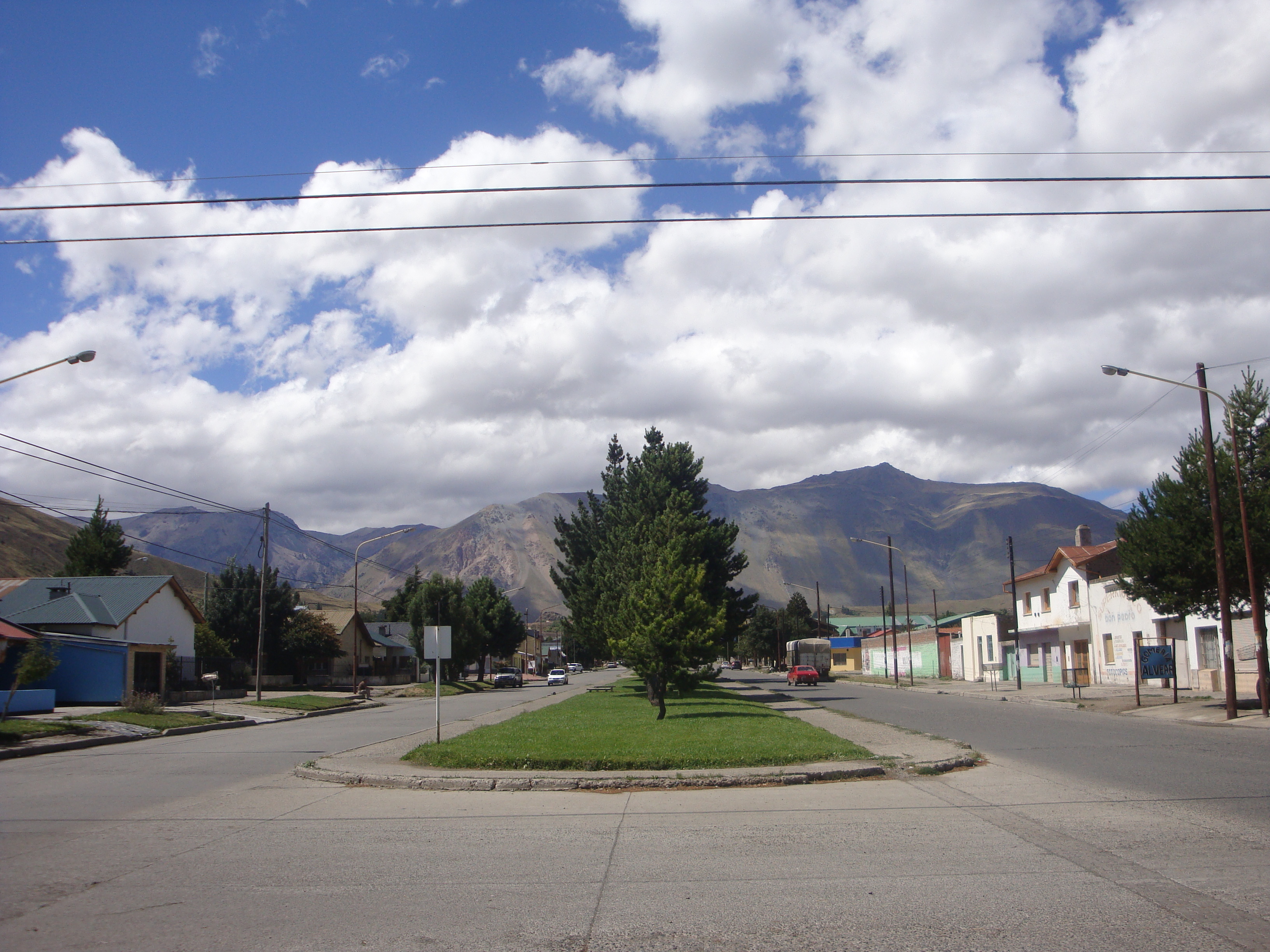 Calle de la ciudad de Esquel, provincia del Chubut, Argentina.